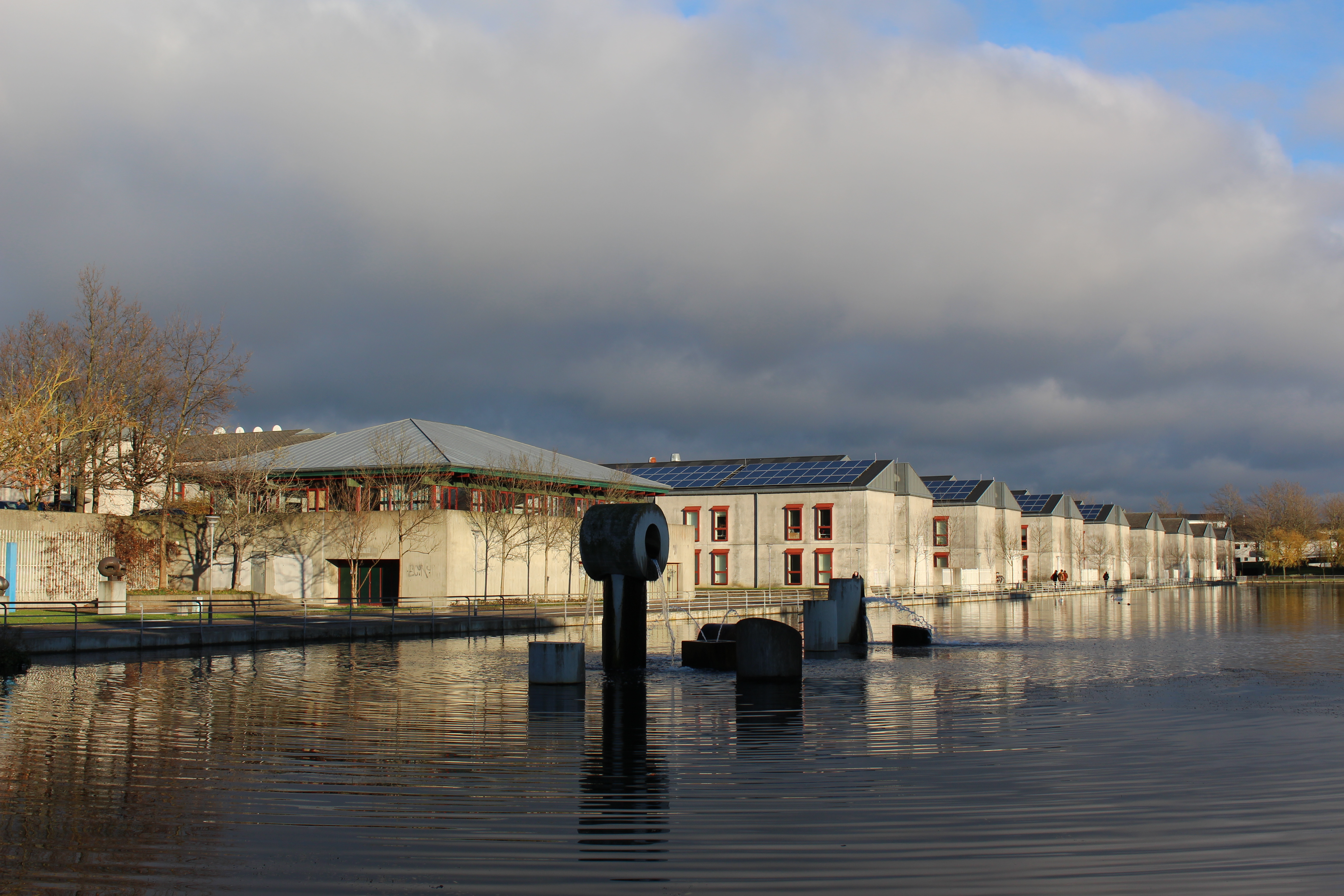 Danmarks Internationale Kollegium i Albertslund